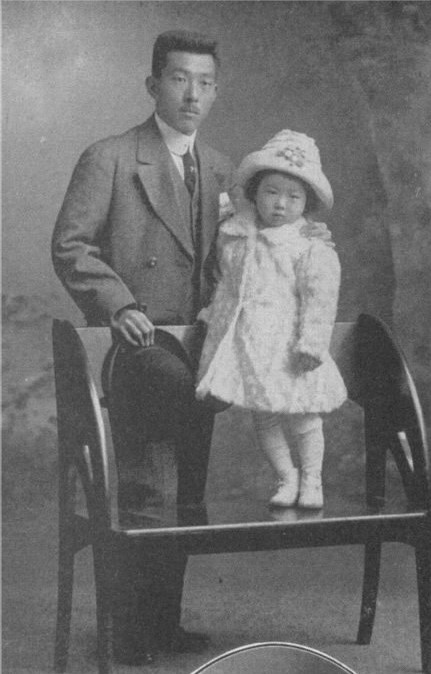 石川成秀子爵